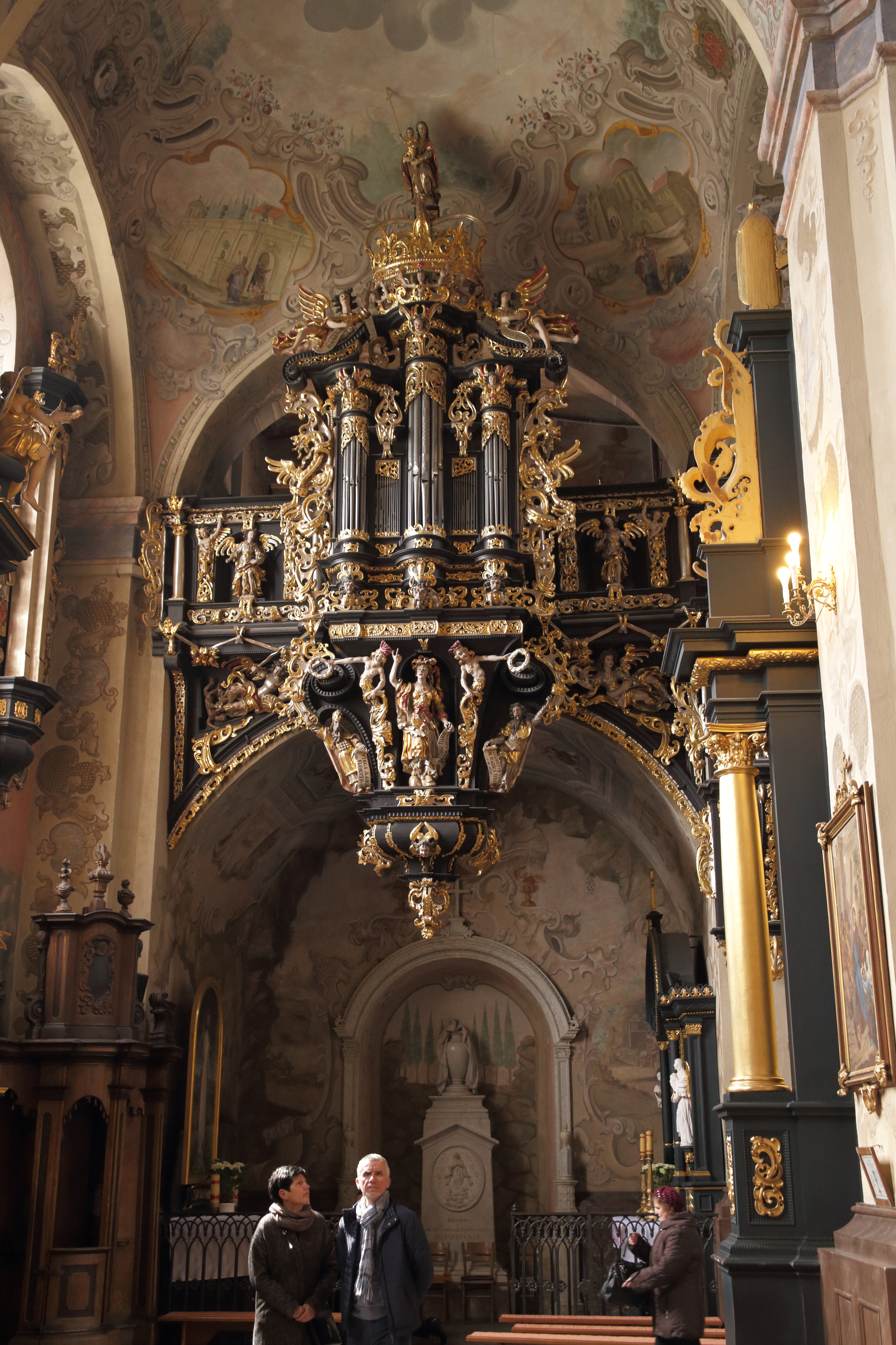 Organy w Leżajsku - organy w nawie południowej.